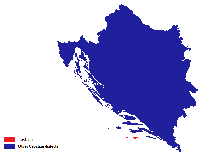 Lastovski dijalekt